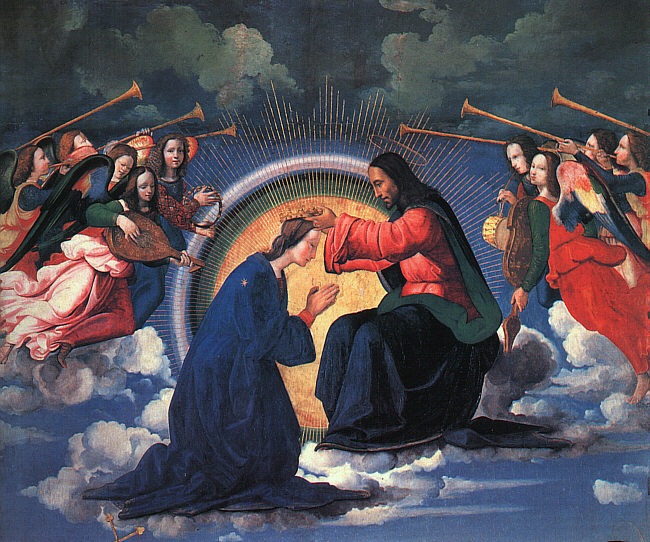 detail